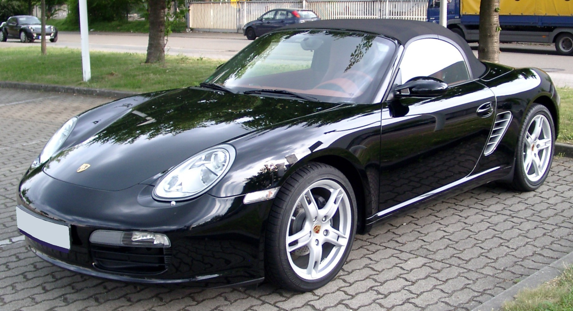 Porsche Boxster (Typ 987)